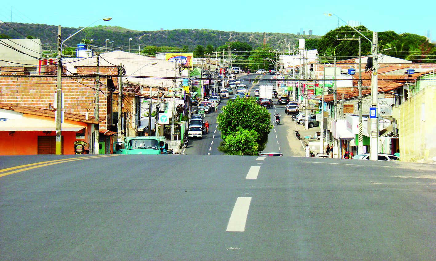 Urbanização